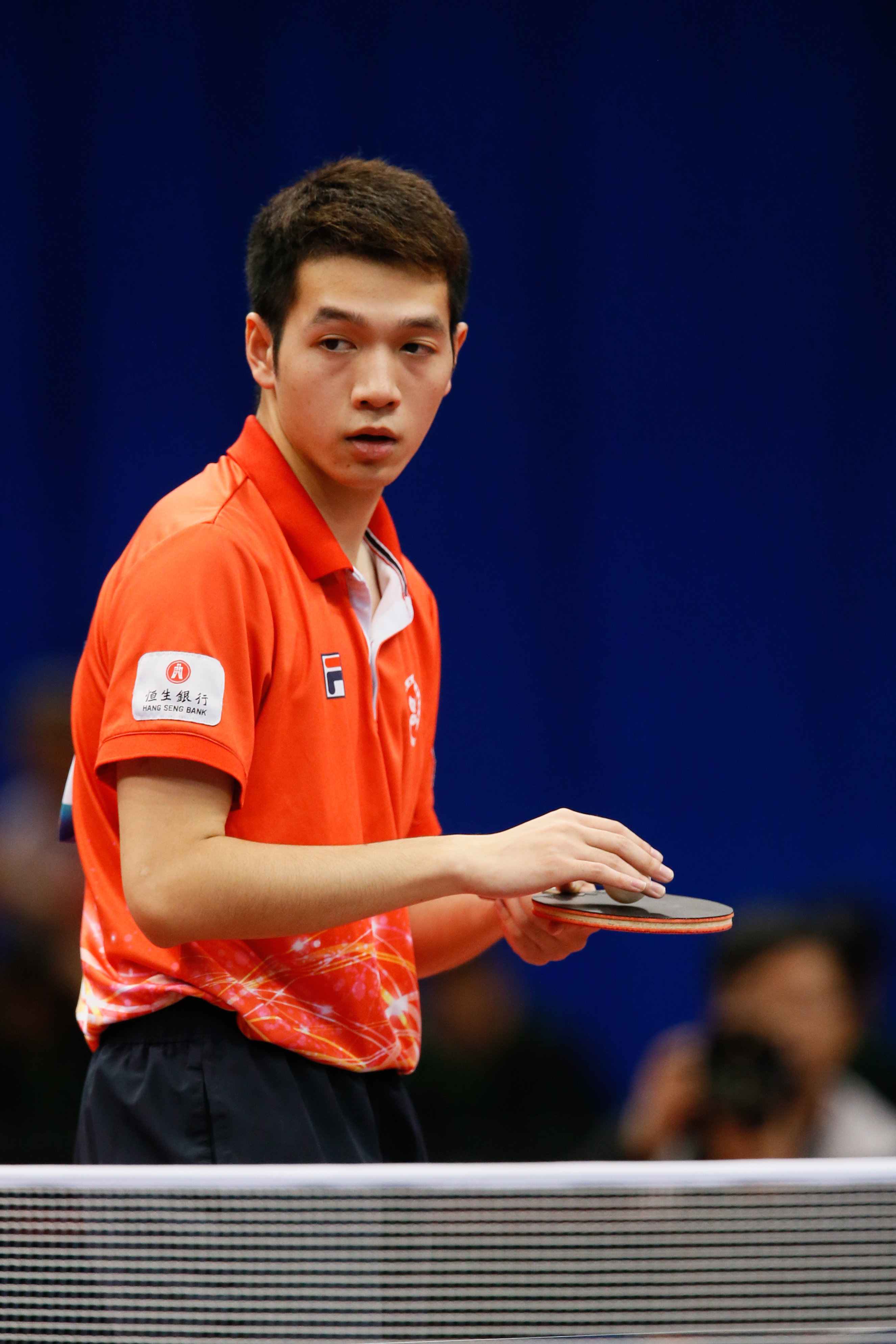 _K0K0021